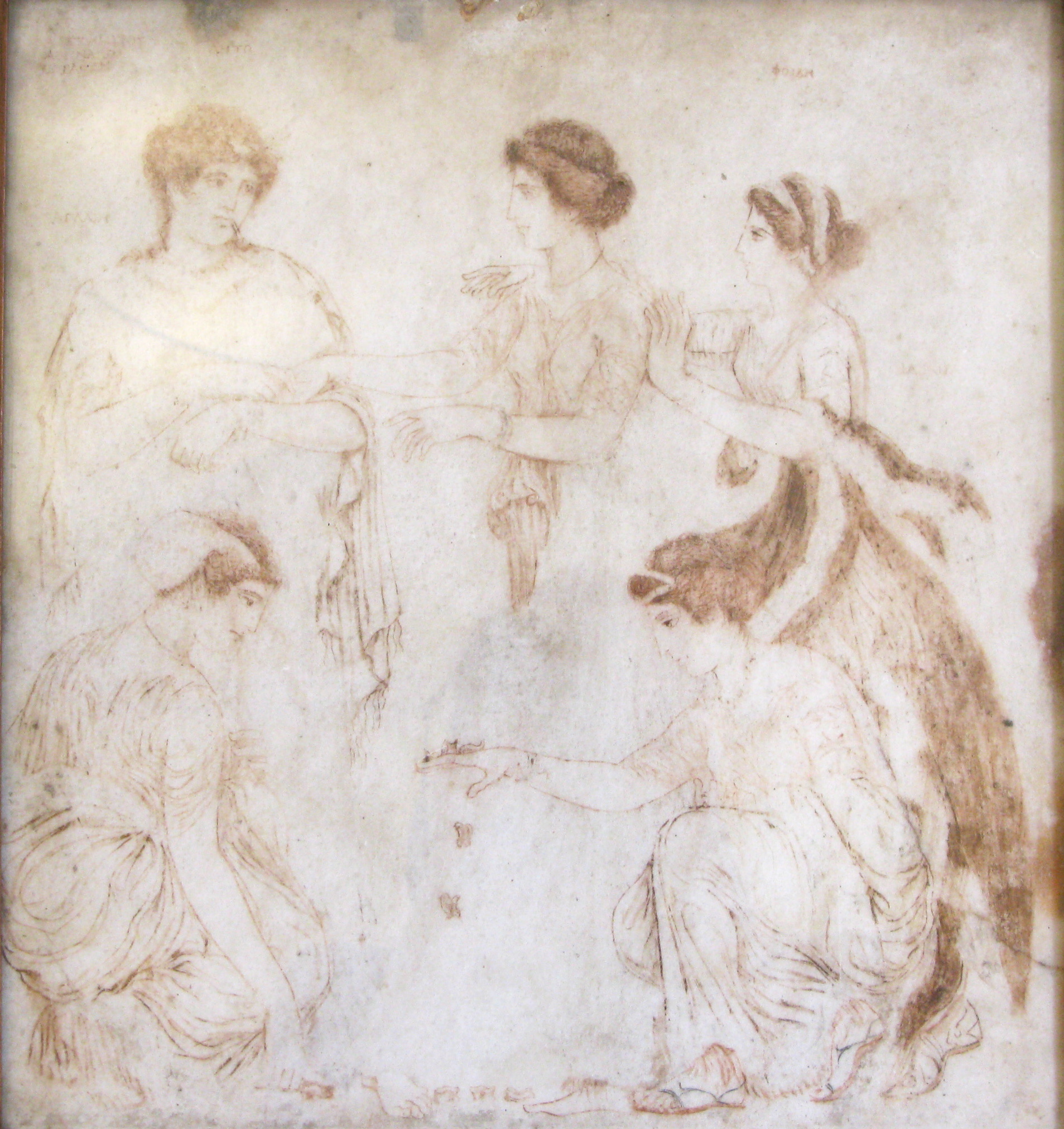 Le Giocatrici di astragali, da Ercolano, dipinto su marmo, opera firmata da Alessandro di Atene (ALEXANDROS ATHENAIOS EGRAPhEN - Alessandro ateniese dipinse - nell'angolo in alto a sinistra), oggi nel Museo Archeologico Nazionale (Naples) (inv. 9562). I nomi scritti in greco accanto alle diverse figure permettono di identificare con sicurezza la scena: si tratta di Febe che cerca di pacificare Latona e Niobe, mentre a terra due delle niobidi, Hilearia e Agle, continuano a giocare con gli astragali, inconsapevoli della loro imminente morte.